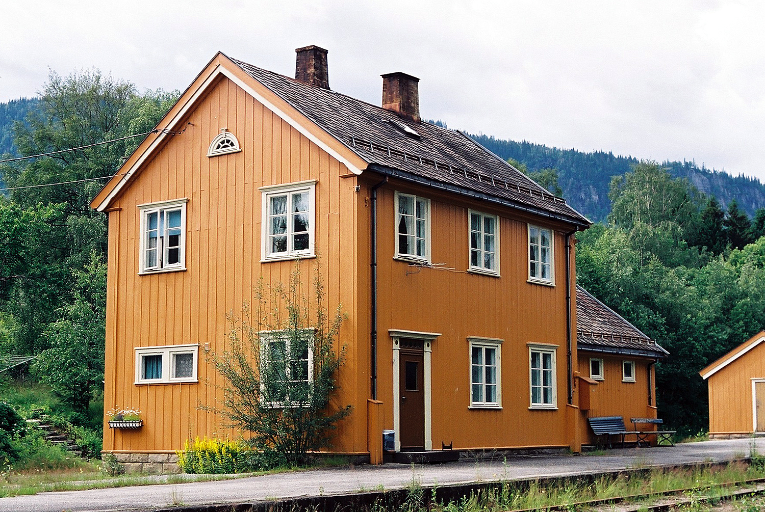 Veggli stasjon, Numedalsbanen.